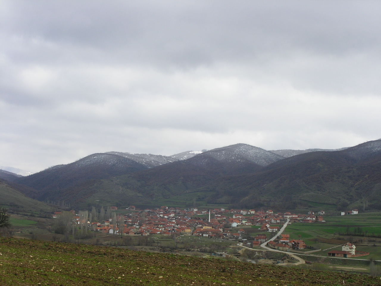 Gornja Šipašnica